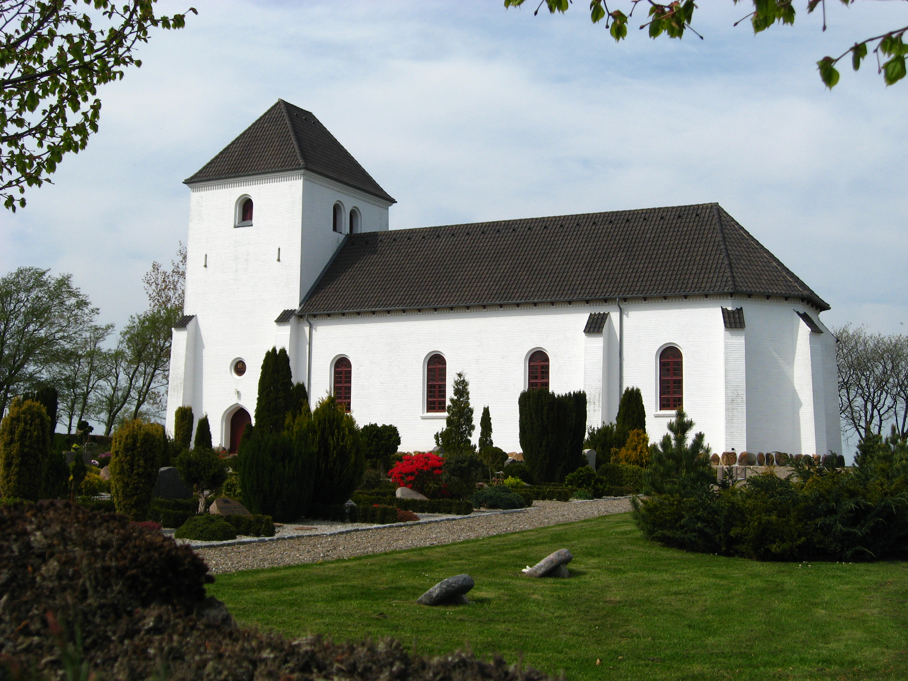 Mylund Kirke, Brønderslev Kommune